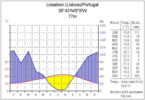 Klimadiagramm Lissabon fulug